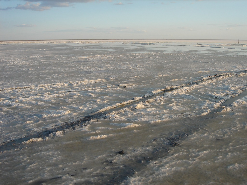 Lake Elton in summer